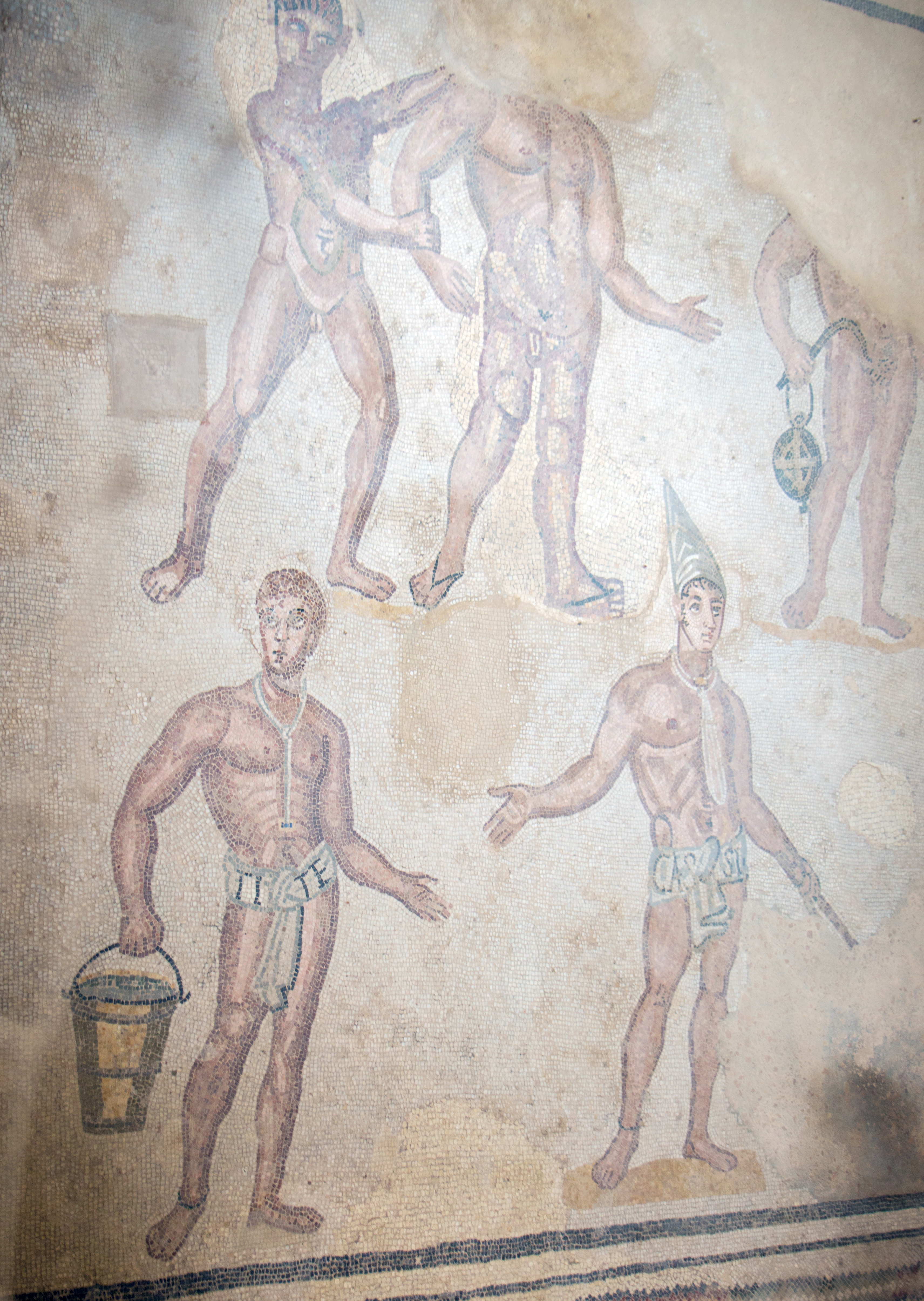 Villa Romana del Casale